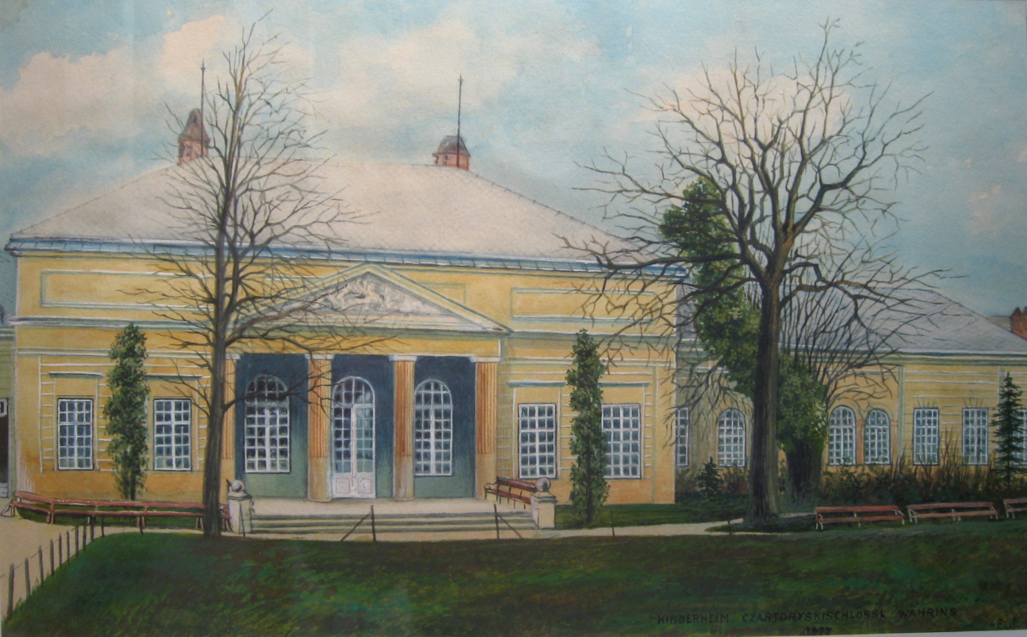 Kinderheim Czartoryskischlössl Währing